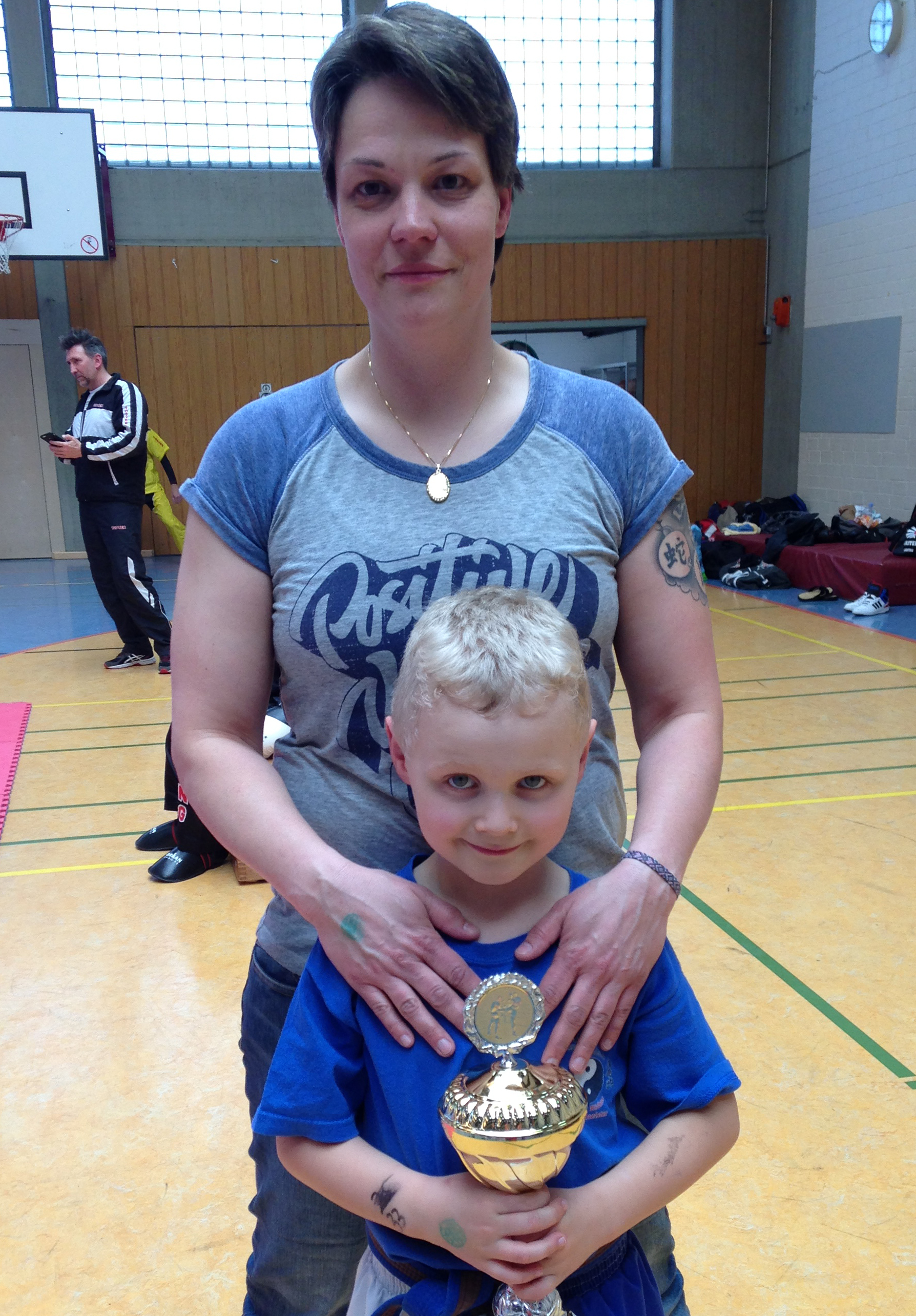 Andrea Schnell unterrichtet Kung Fu, Kickboxen und Selbstverteidigung